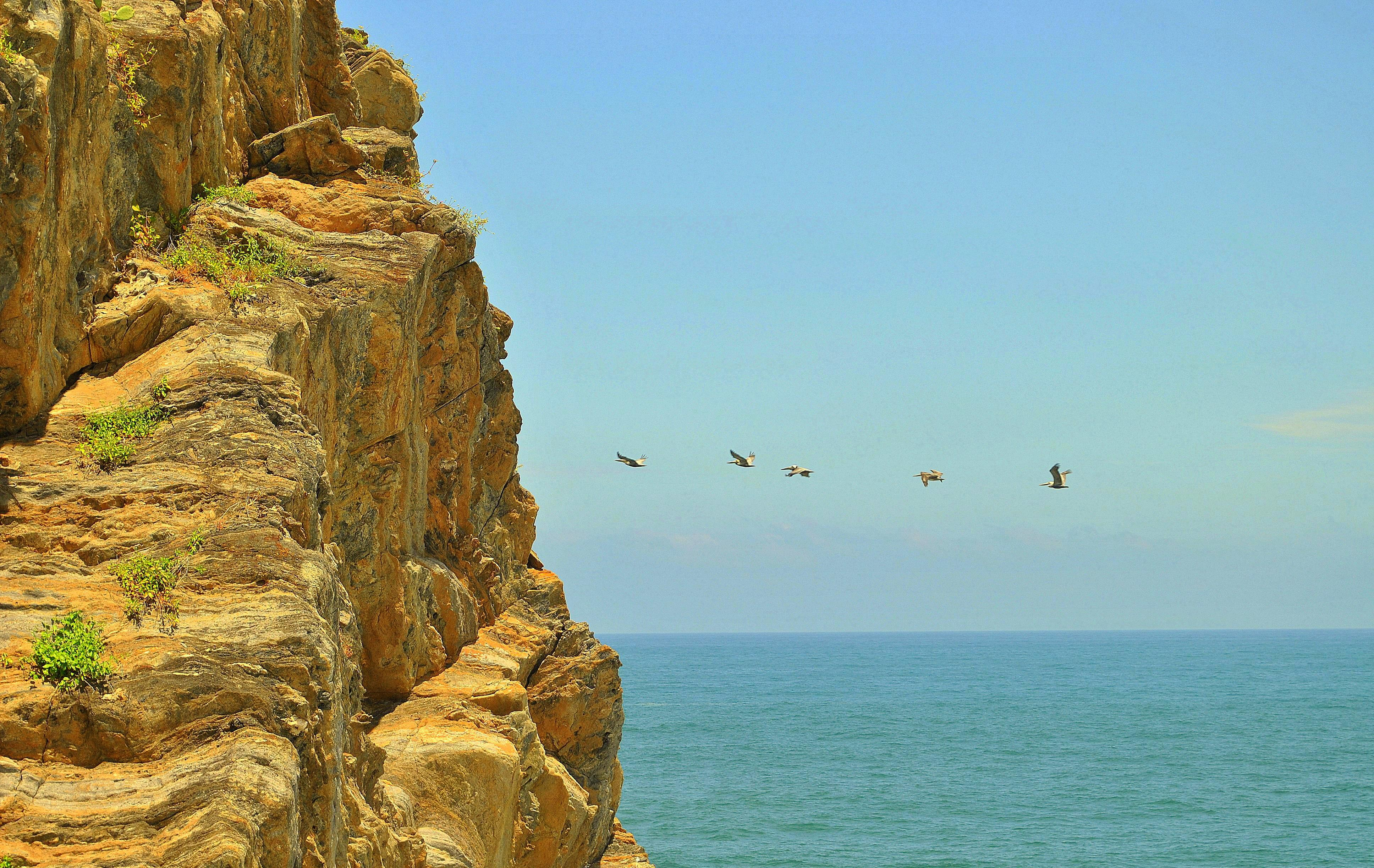 Estado Aragua